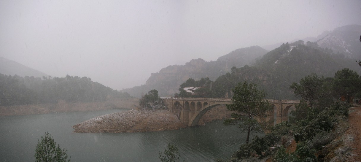 Schneesturm über Ulldecona Stausee